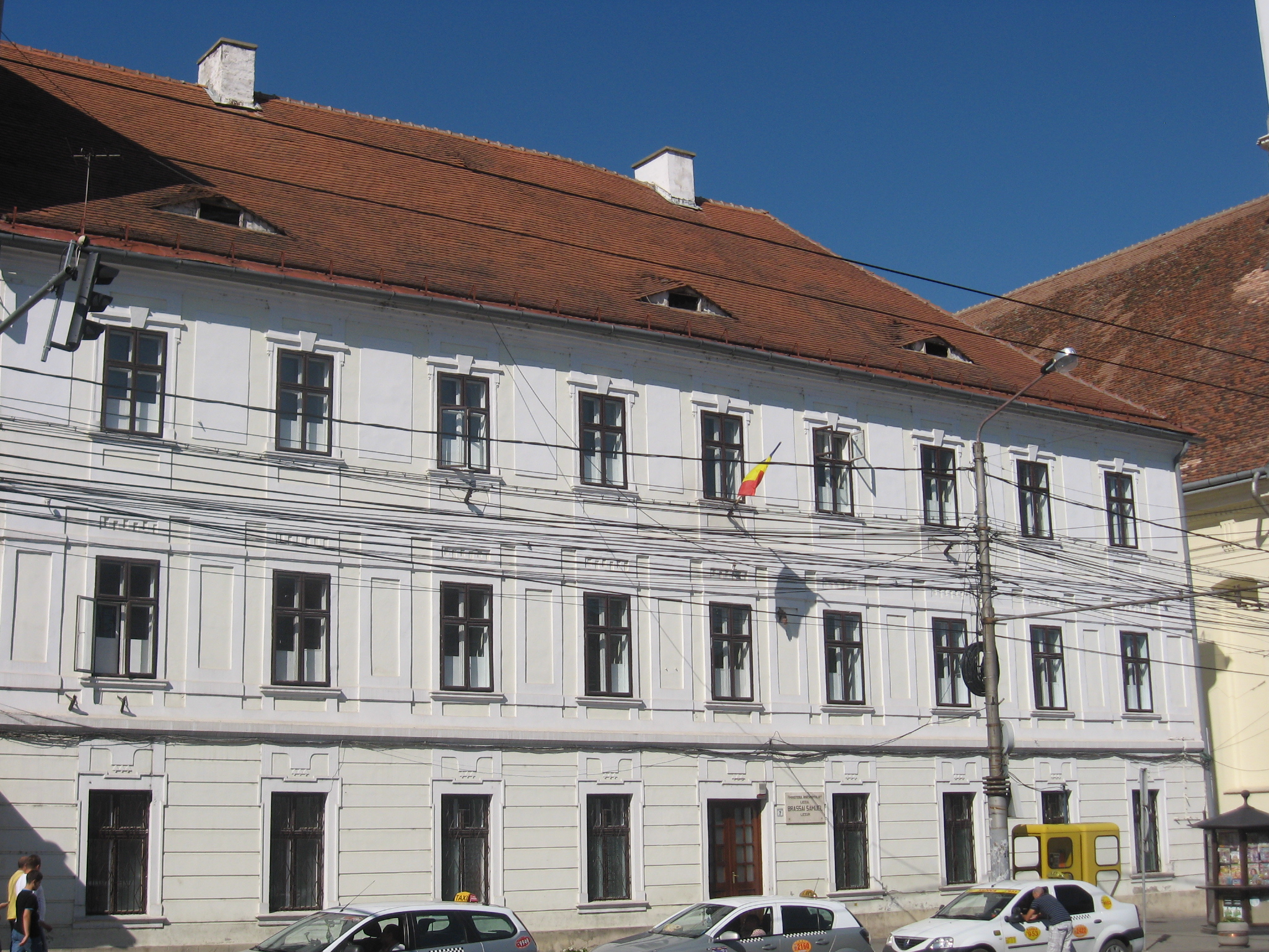 Cluj-Napoca, Liceul Teoretic Brassai Sámuel (str. 21 Decembrie 1989 nr.9)